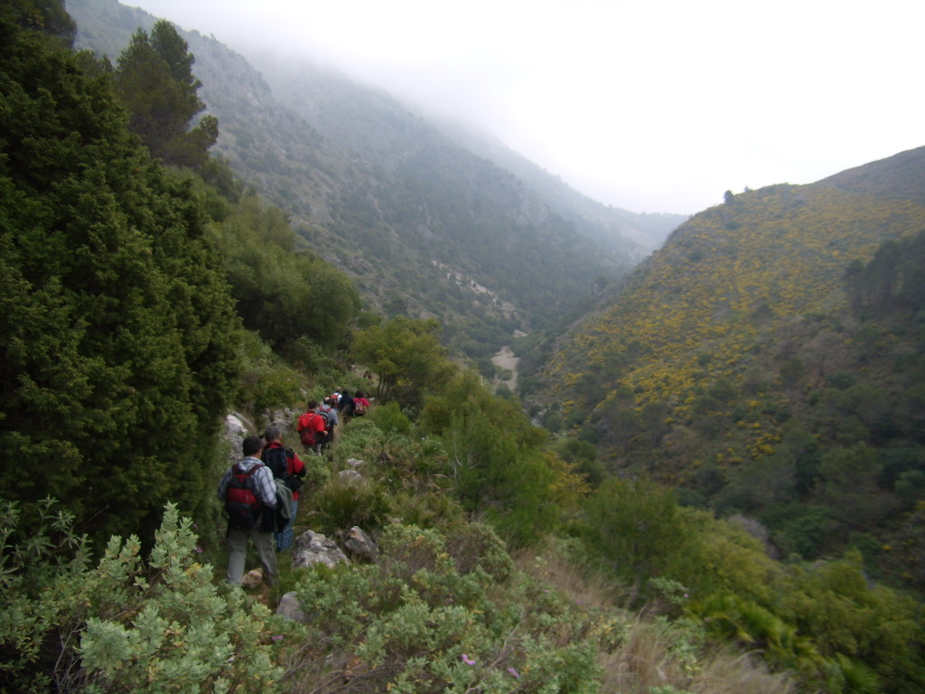 Verde River, Málaga